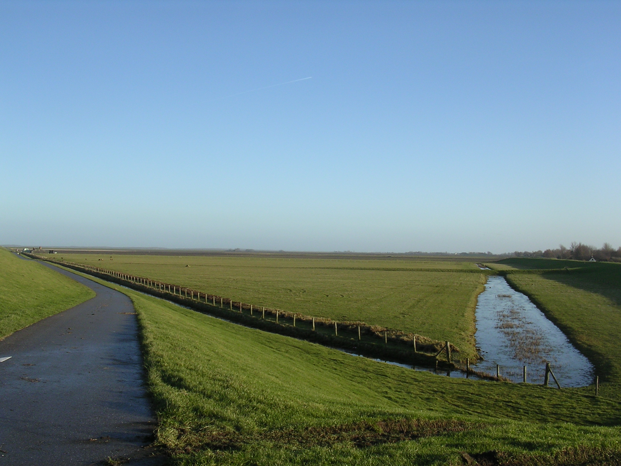 Polder fan Eanjum en Ljussens (Polder north of Anjum en Lioessens)